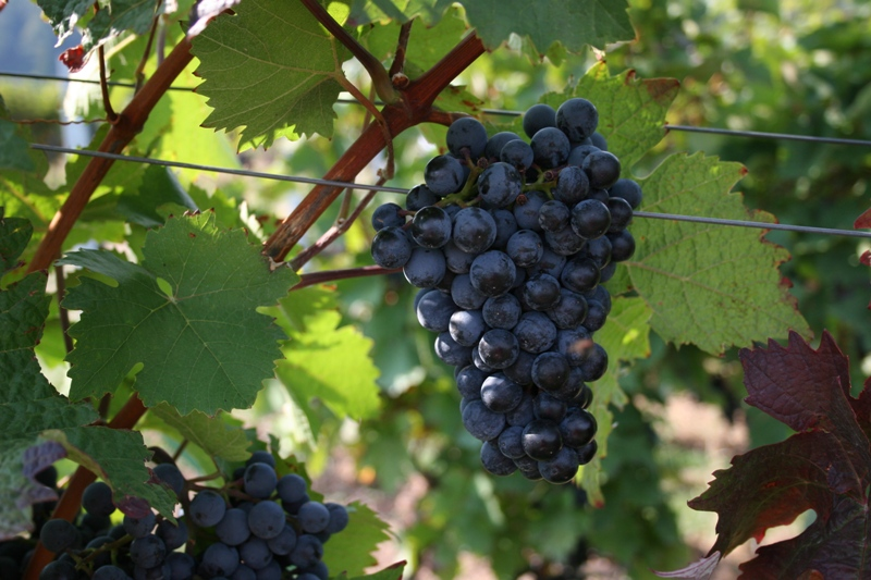 Une grappe de raisin.